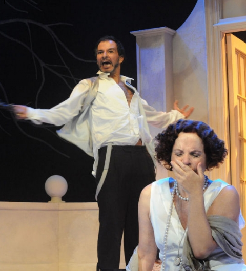 יוסי עיני כלופכין בהצגה גן הדובדבנים